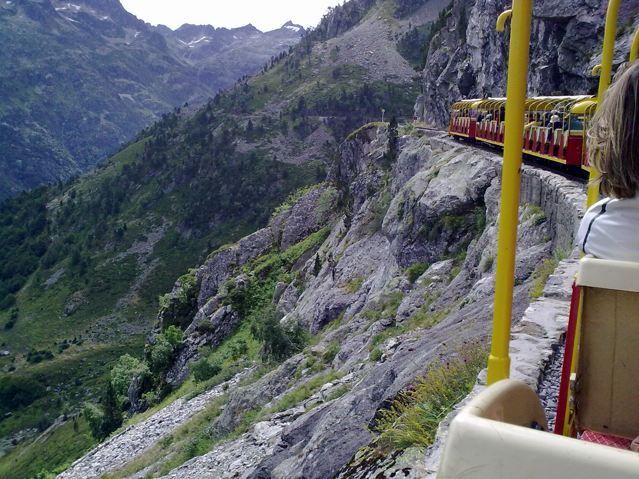 Le petit train d'Artouste le 25 juillet 2010.